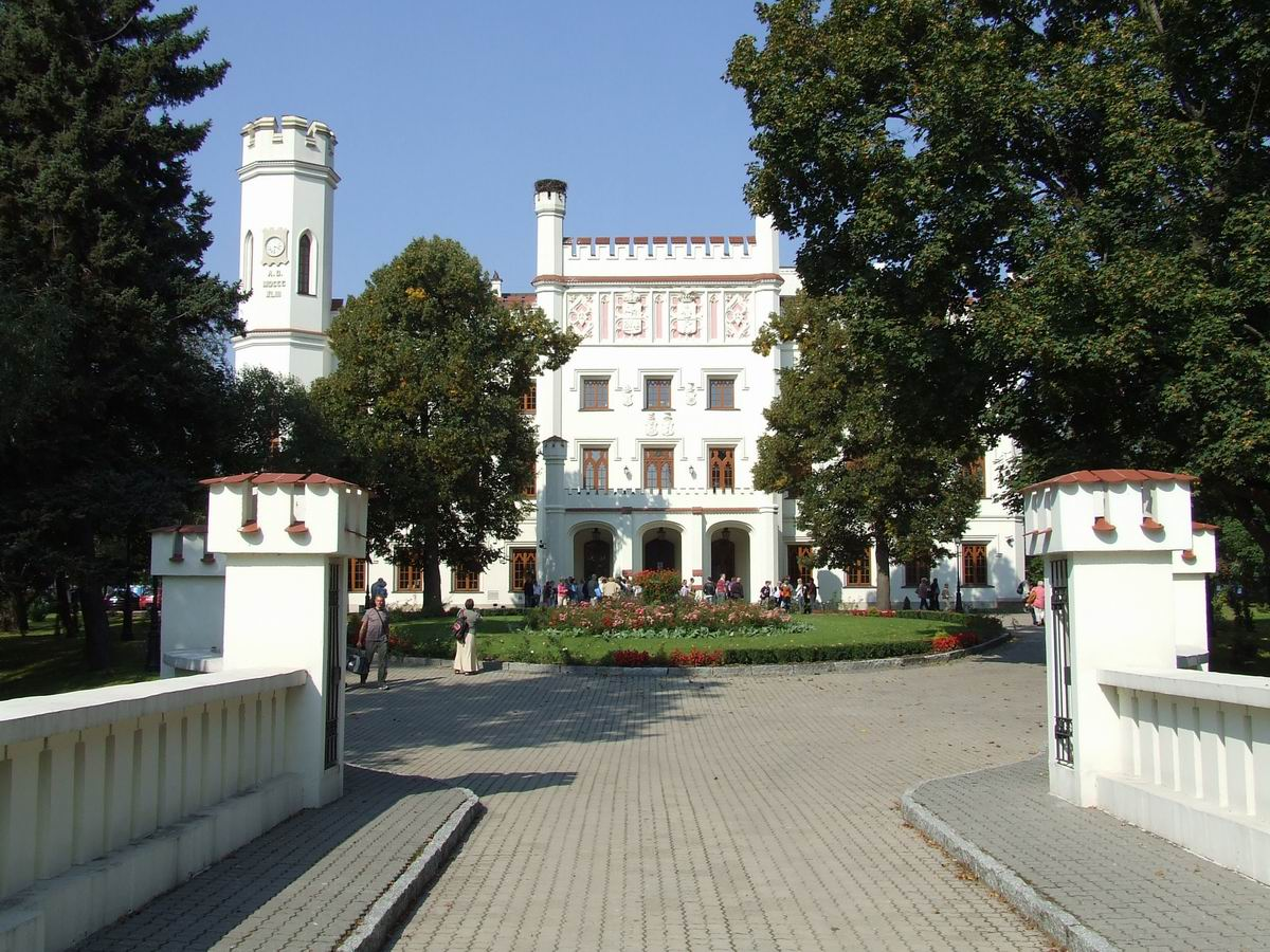 Starawieś koło Węgrowa w gminie Liw, pałac Radziwłłów XVI-XVII w